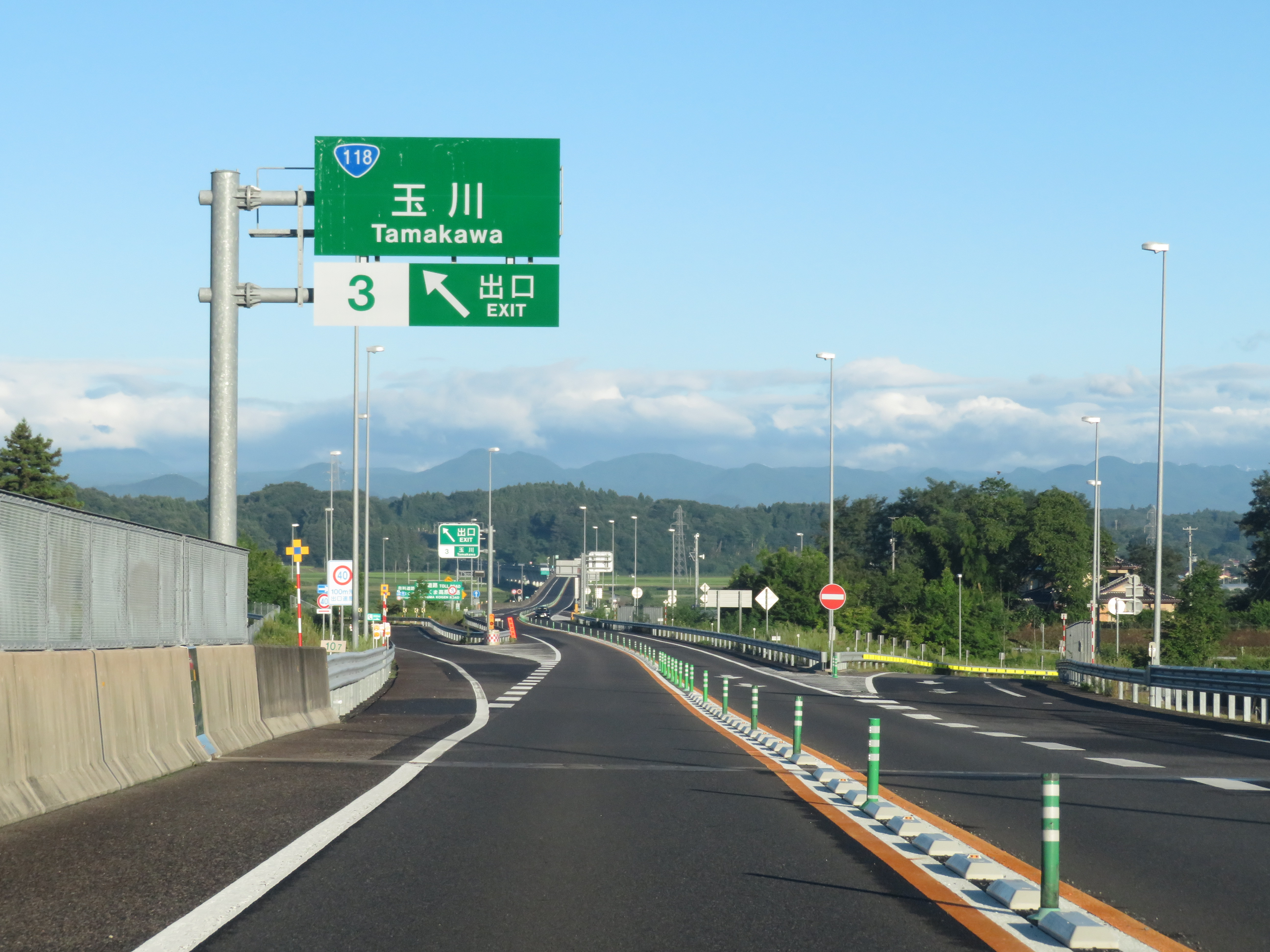 あぶくま高原道路玉川ＩＣ出口付近（矢吹ＩＣ方面を撮影） Canon PowerShot SX720 HS